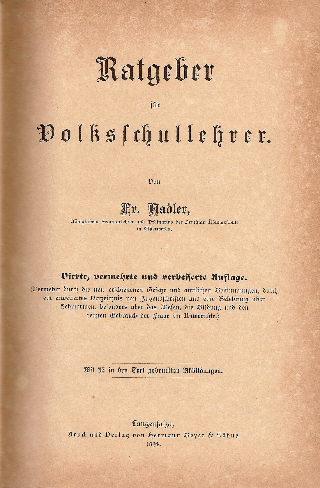 Der Ratgeber für Volksschullehrer von Friedrich Nadler, vierte Auflage von 1894.